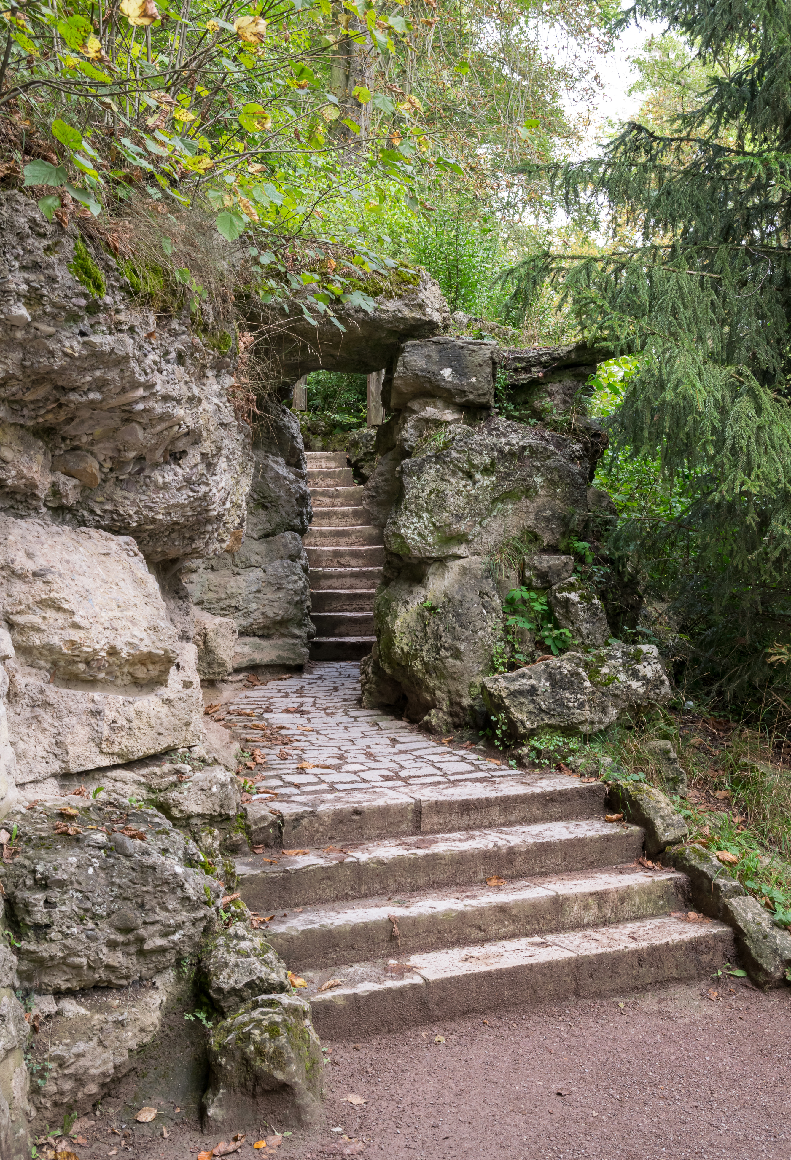 Treppe im Ilmpark, Weimar